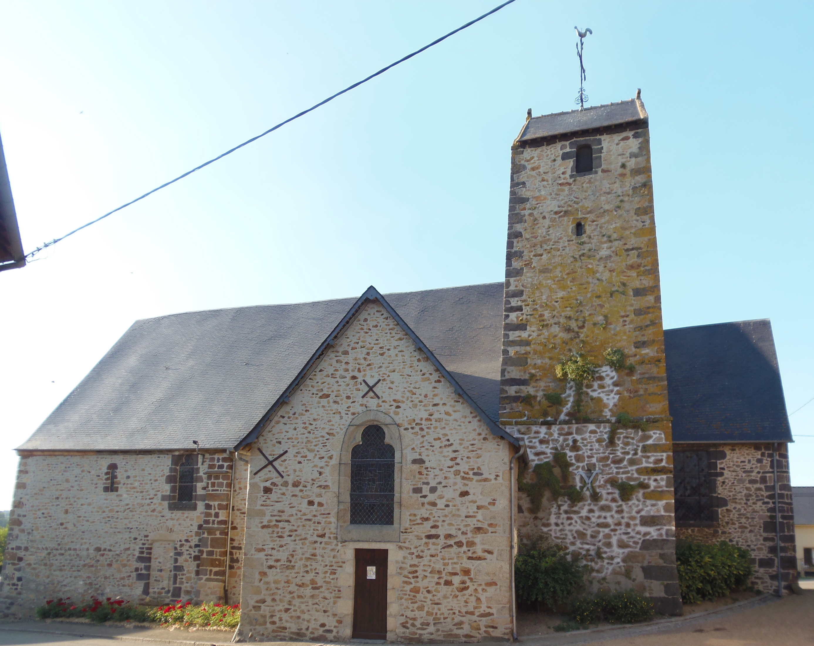 Gesvres (Pays de la Loire, France). L'église Saint-Pierre.